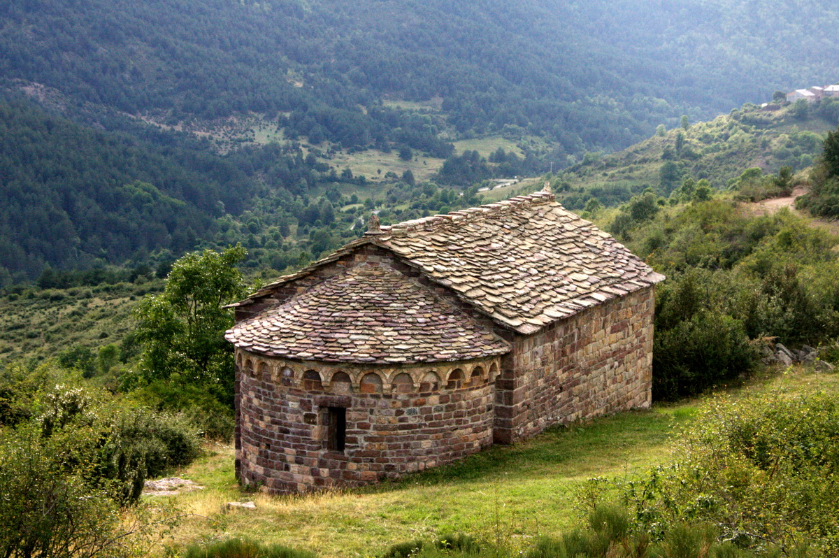 Ermita de Turbide a Les Paüls (la Franja-Osca)